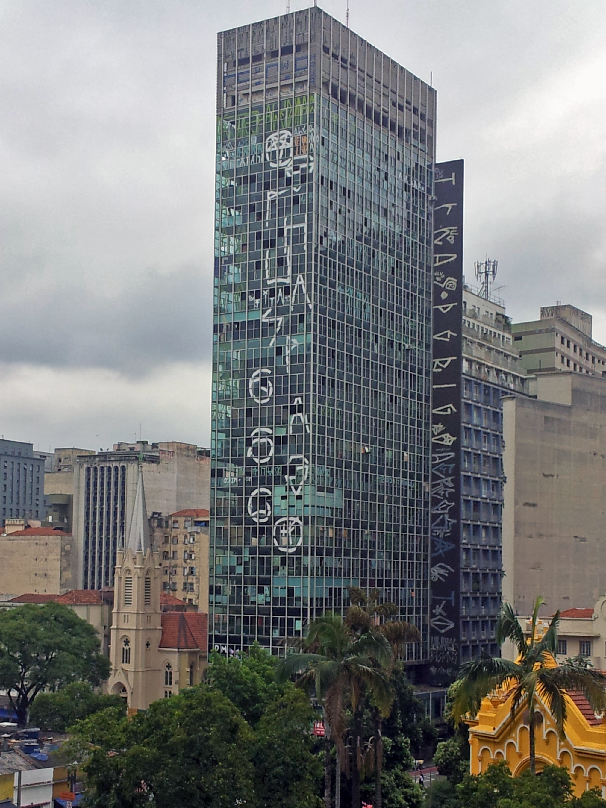 Centro, São Paulo - State of São Paulo, Brazil